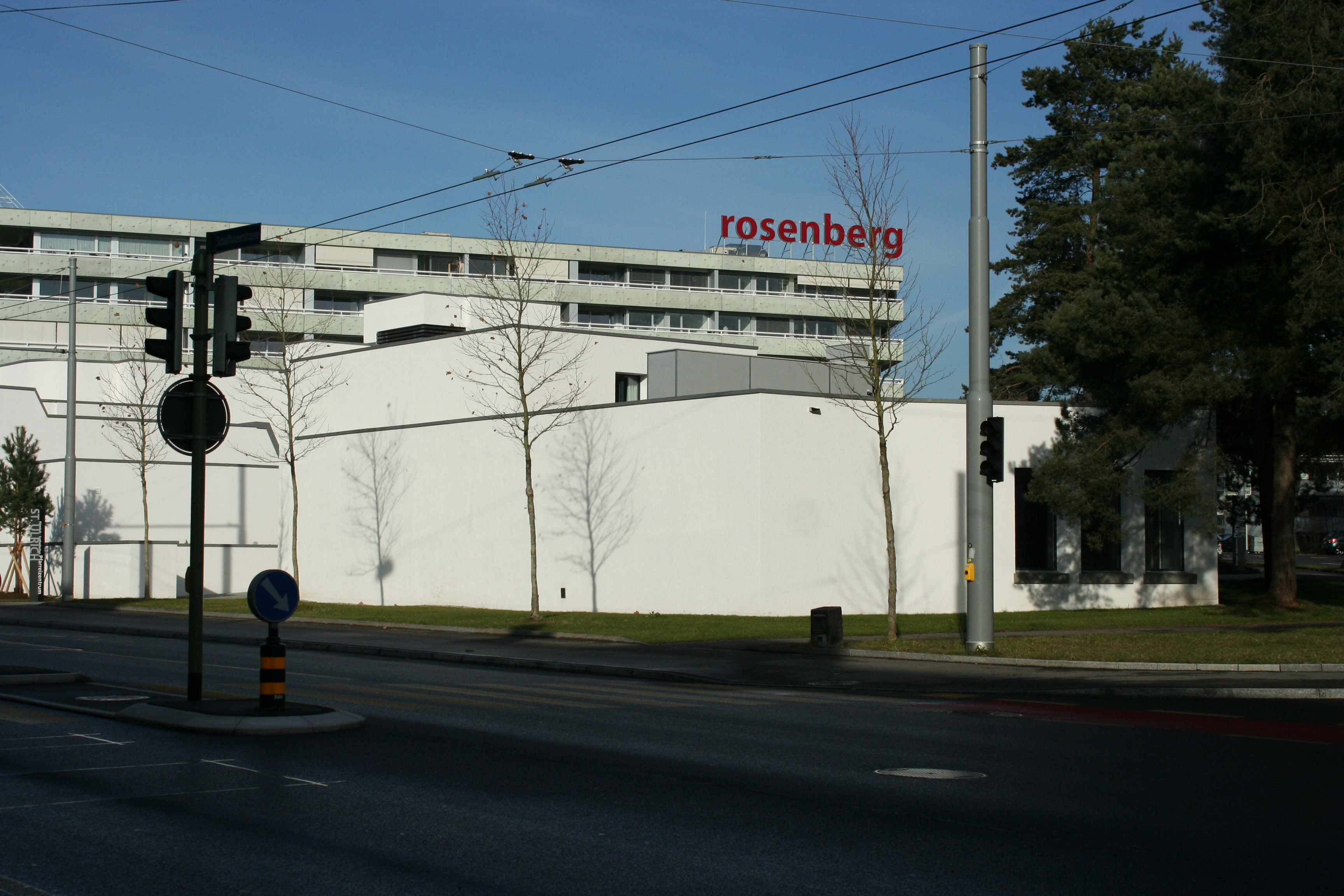 Römisch-katholische Pfarrkirche St. Ulrich Winterthur-Rosenberg, Ansicht von der Schaffhauserstrasse